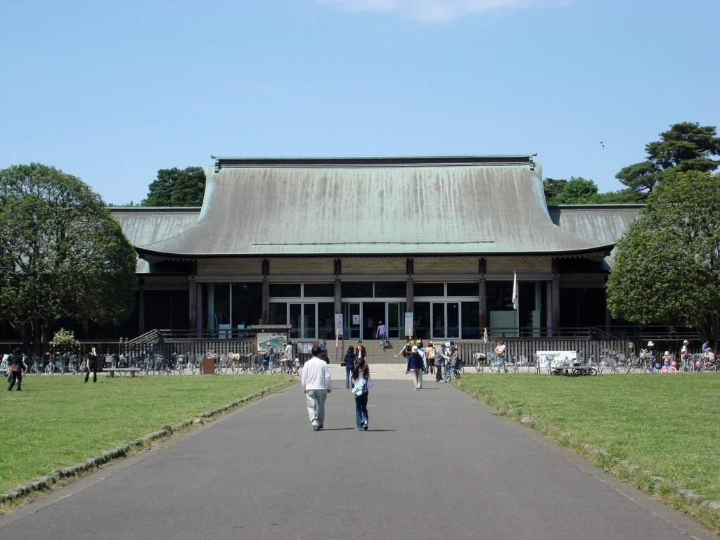 %u5165%u5834%u53E3 Entrance %u6C5F%u6238%u6771%u4EAC%u305F%u3066%u3082%u306E%u5712 Edo-Tokyo Open Air Architectural Museum Koganei, Tokyo, Japan 2007.05.20